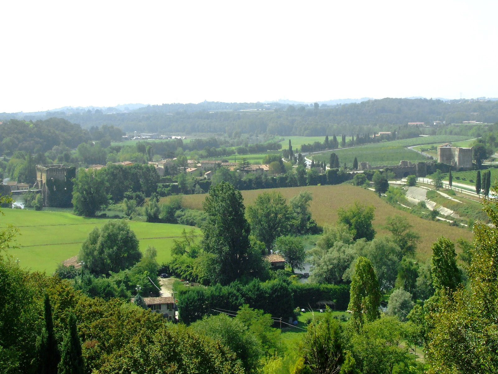 vista di Borghetto